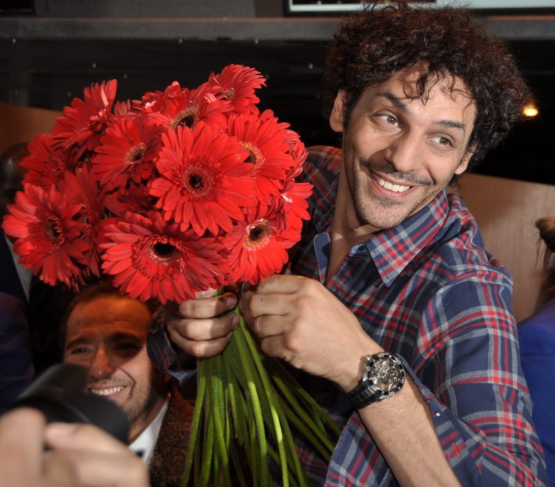 Tomer Sisley à l'ouverture du Printemps du cinéma. En arrière-plan, à demi caché, Patrick Timsit